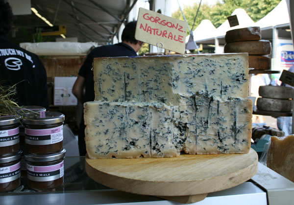 gorgonzola